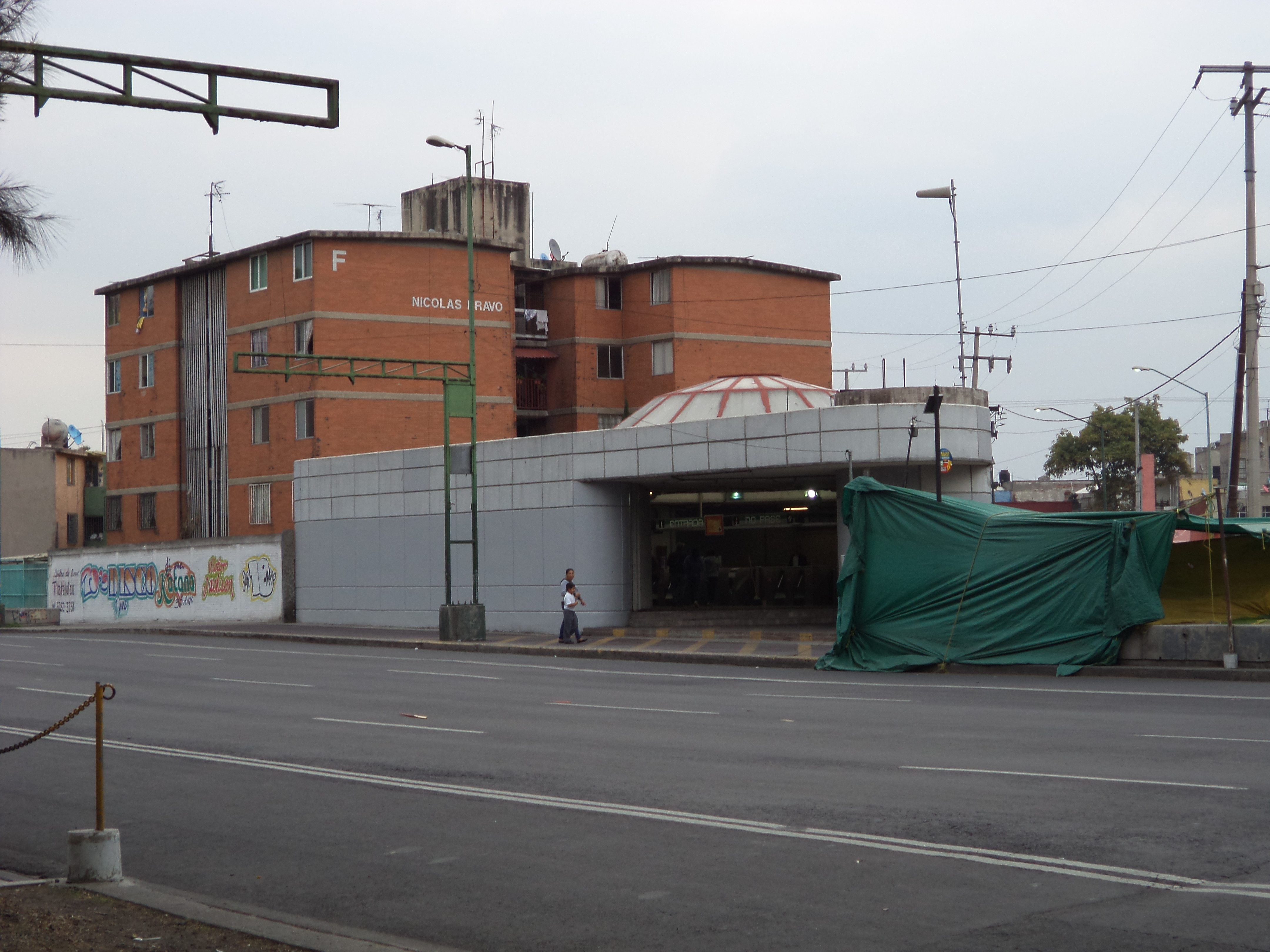 Estacion Morelos LB